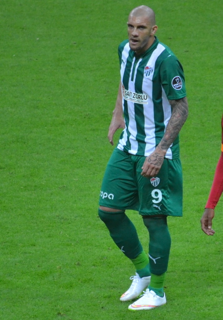 Fernandao 2015